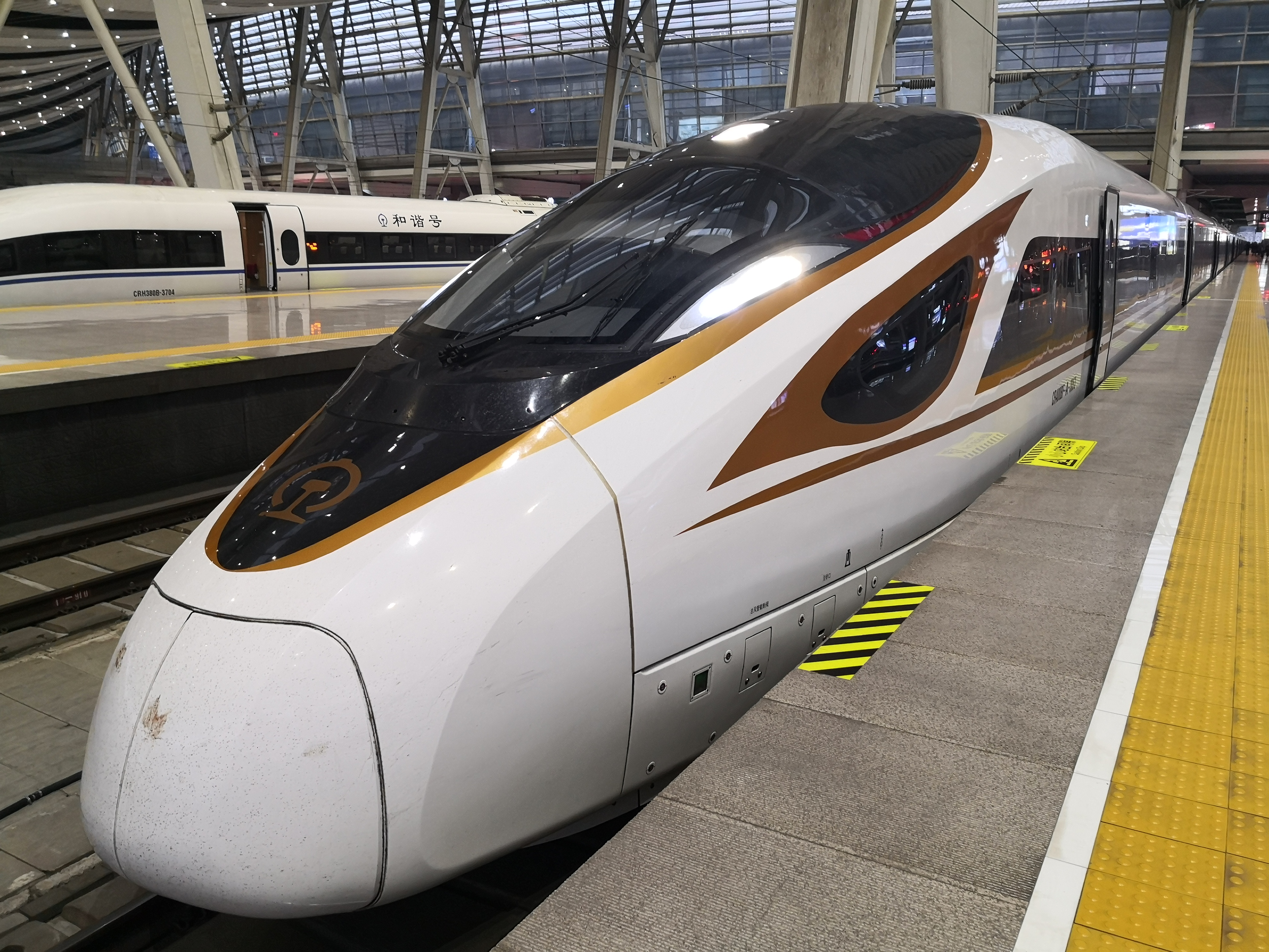 即将发车的G205次列车停靠在北京南站16站台